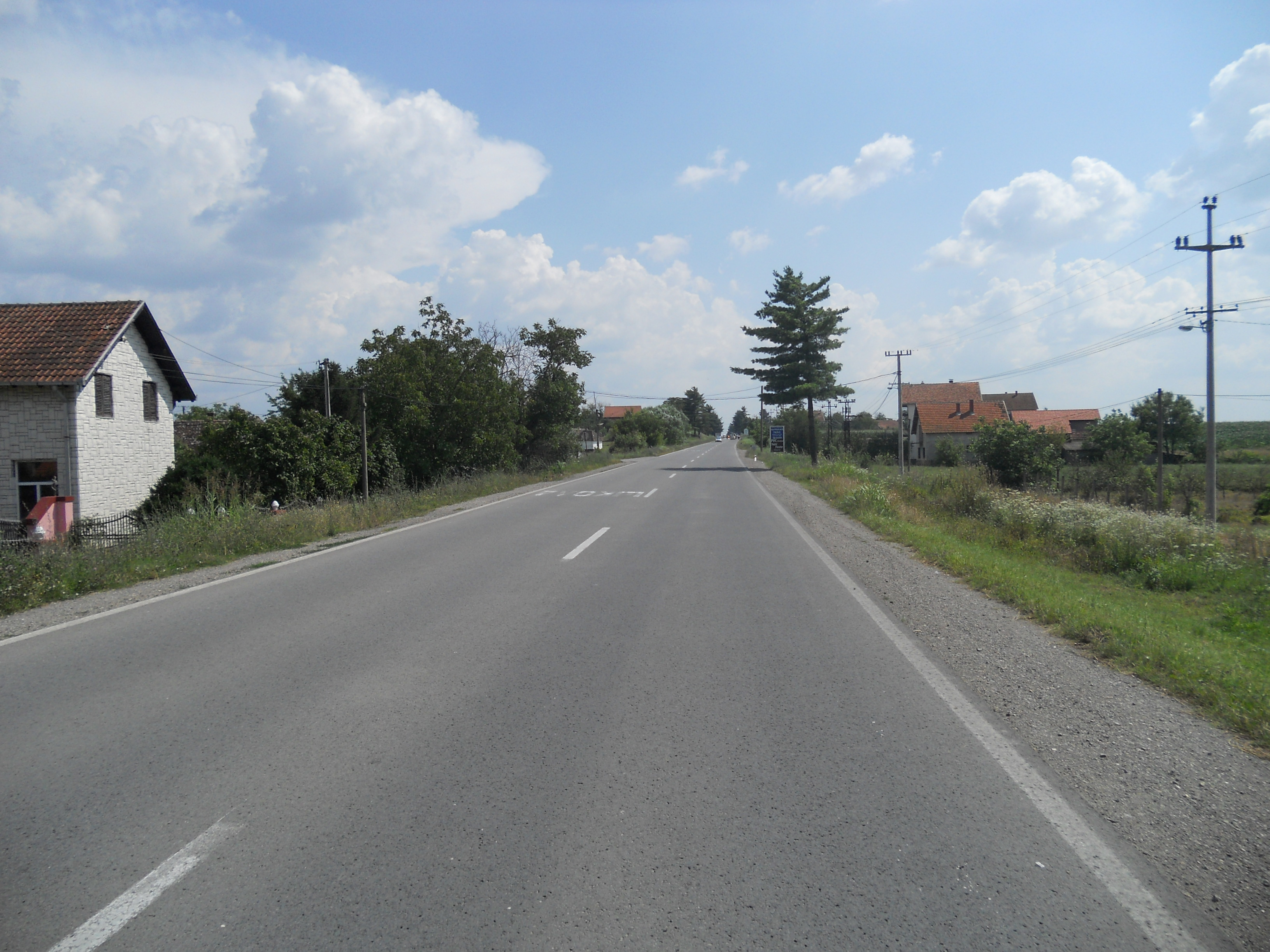 Jelenča (magistralni put Šabac-Valjevo), foto: Darko Gajić